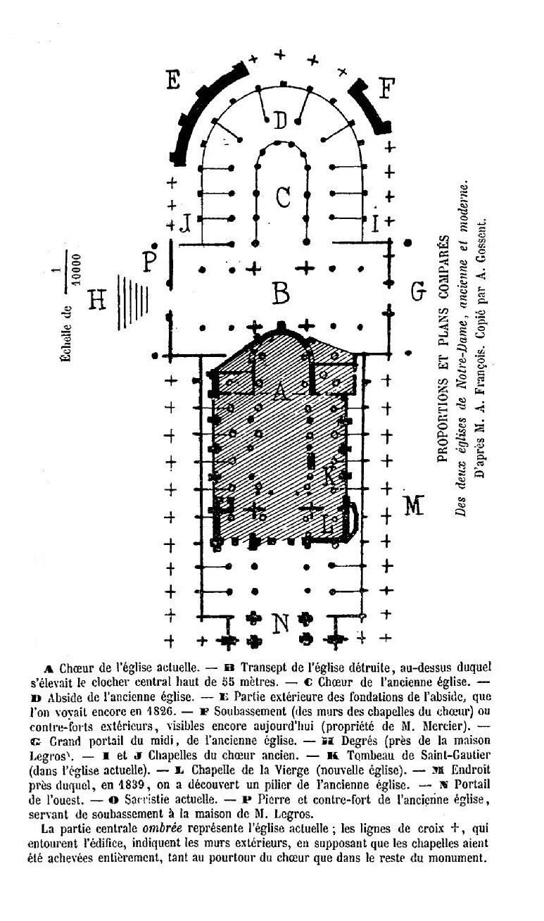 Plan de la basilique Notre-Dame détruite en 1589, d'après Henri Le Charpentier.